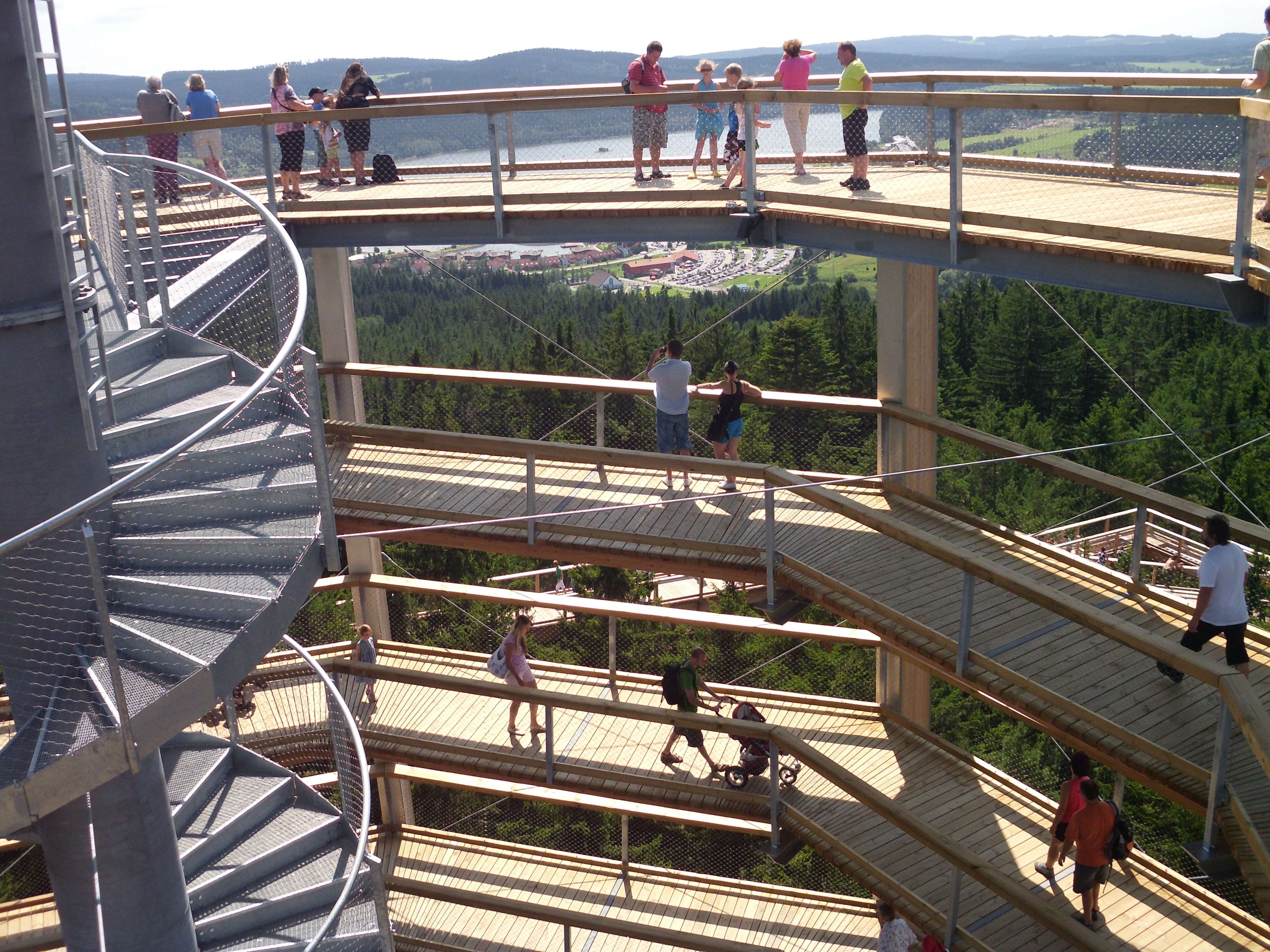 rozhled